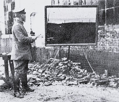 Hauptmann d. L. Hans am Ende (Worpswede) bei der Arbeit